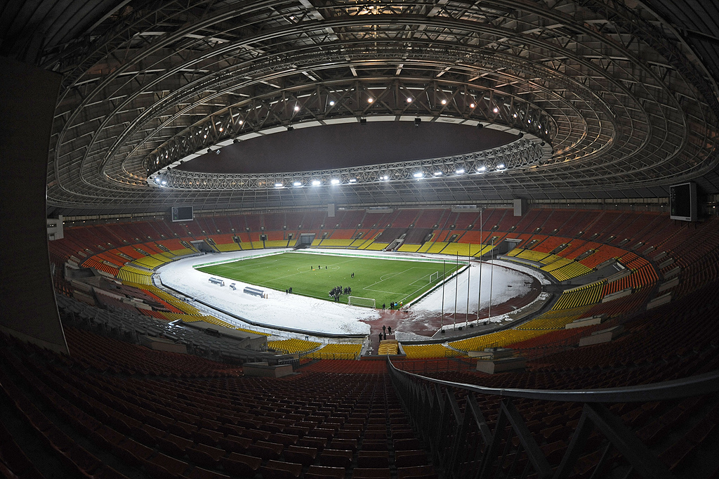 Лужники 2009